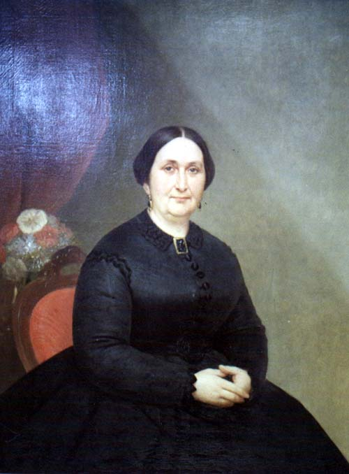 RETRATO DE LA SRA. DE ARREDONDO DE LA CORTE DE R.ALLENDE.